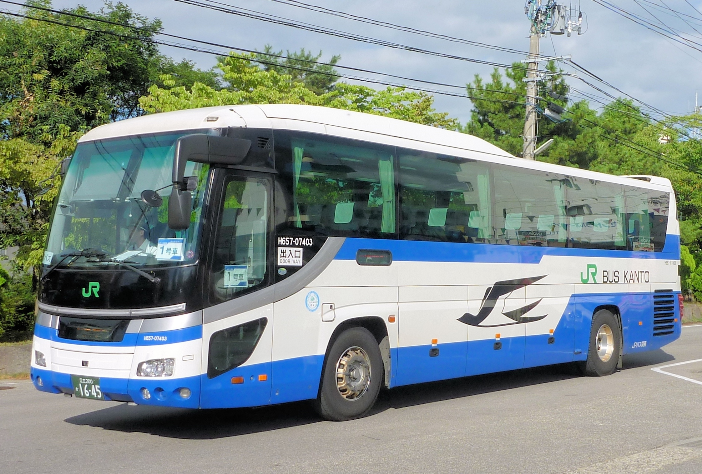 夢街道会津号/JRバス関東/足立200か1645（H657-07403）/日野セレガ